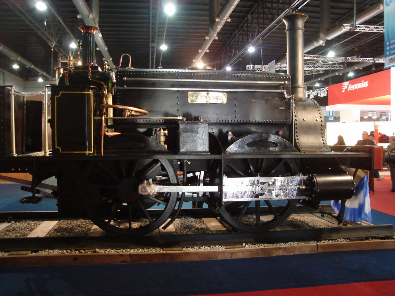 La Porteña, primera locomotora del Ferrocarril Gran Oeste de Buenos Aires, a su vez primer ferrocarril de la Argentina, expuesta en el XXI Congreso Panamericano de Ferrocarriles, predio de la Sociedad Rural Argentina, Buenos Aires.